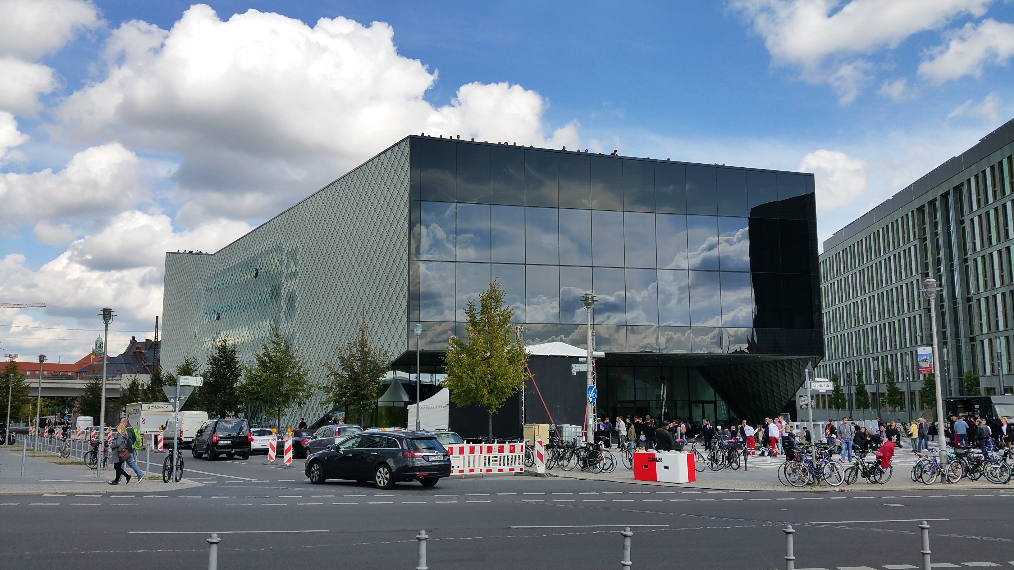 Futurium am öffentlichen Besichtigungstag 2017